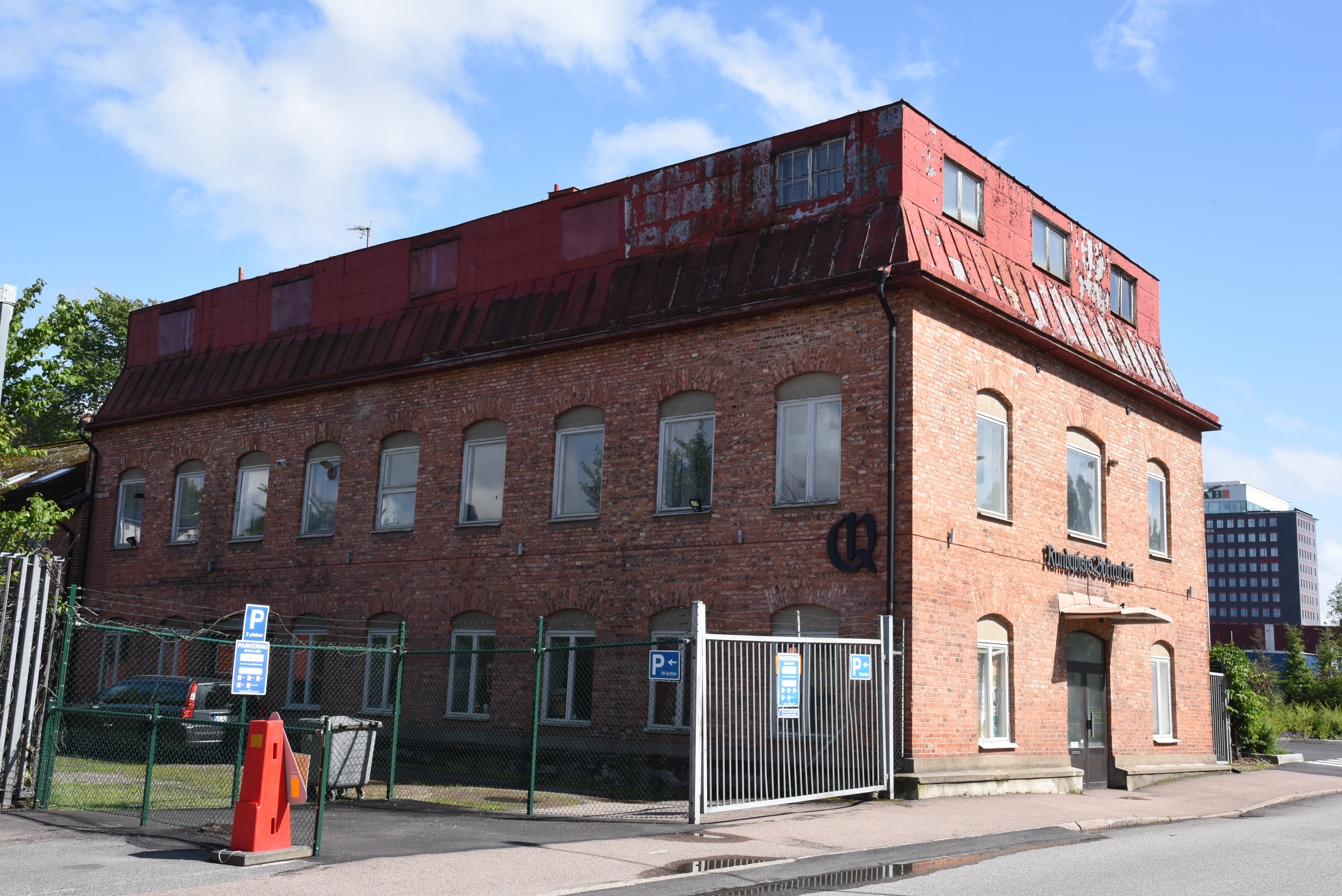 Rundqvists Boktryckeri vid Nellickevägen 7 i stadsdelen Skår i Göteborg.